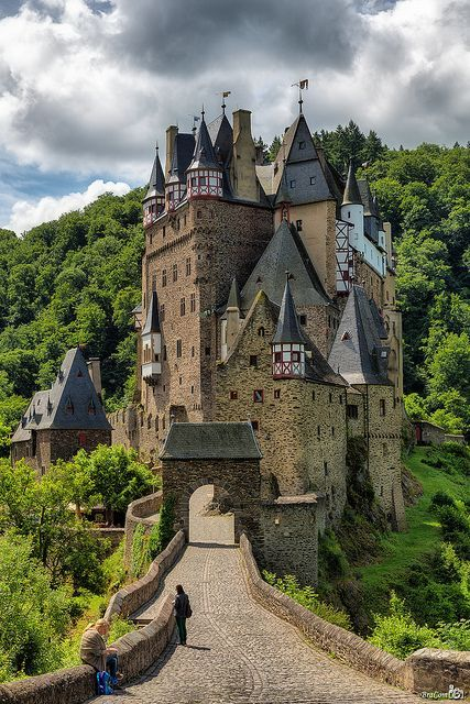 Сучасний вигляд замка, збудованого у ХІІ столітті